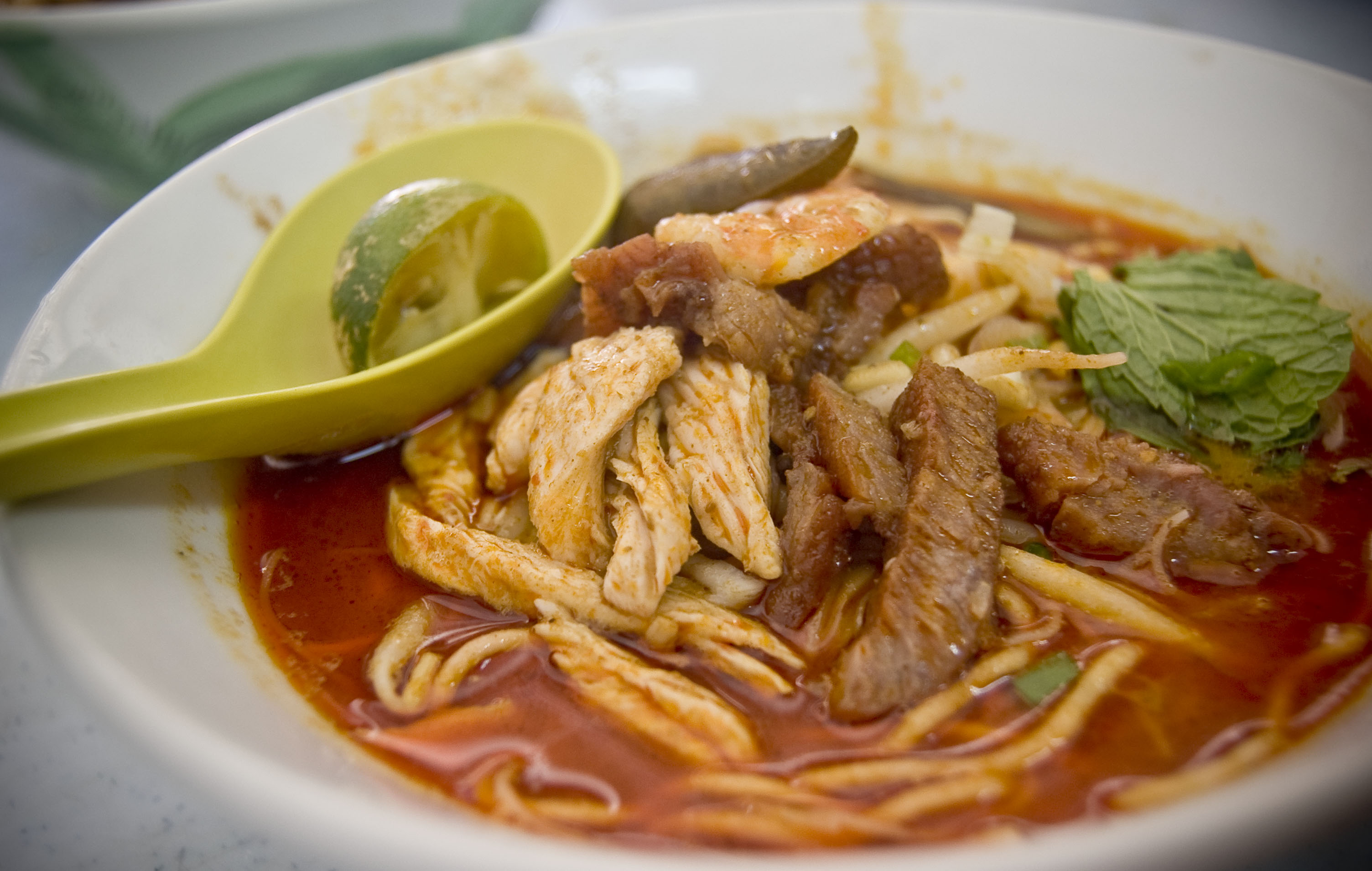 Seng Kee Curry Mee At Jalan Sultan Iskandar.